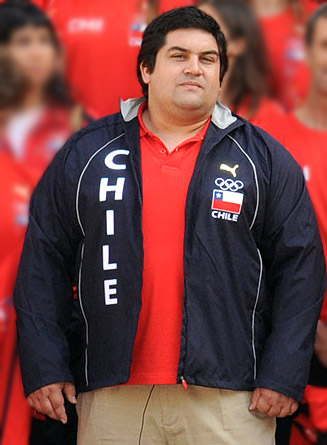 Cristián Escalante, levantador de pesas chileno.